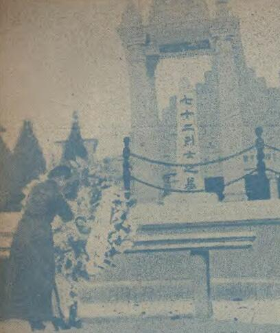 题名： 孙夫人黄花岗献花[照片] 文献来源： 《文献(上海1938)》 出版时间： 1938 年 卷期(页)： [ 第2卷 第6期 ，1页 ]